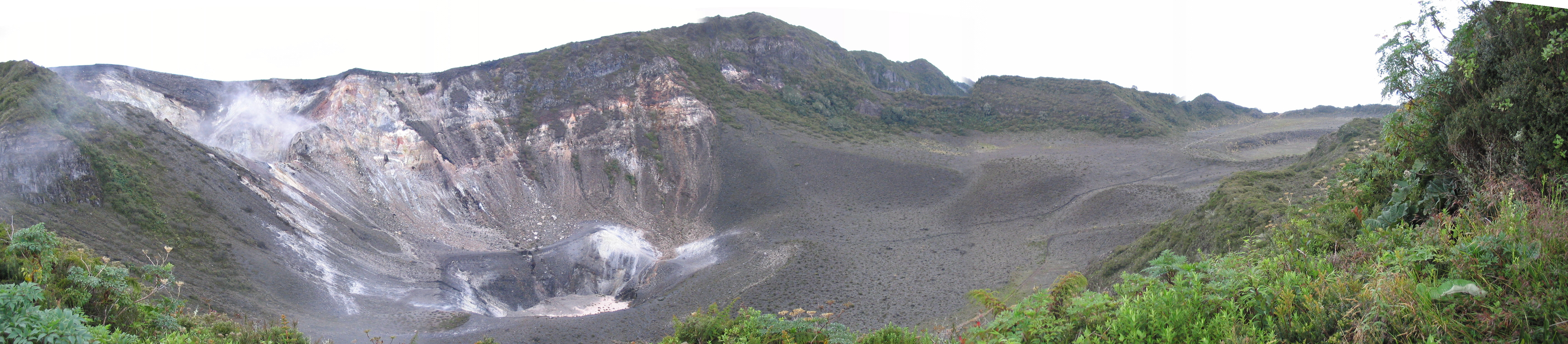 Turrialba Volcano, Cartago, Costa Rica